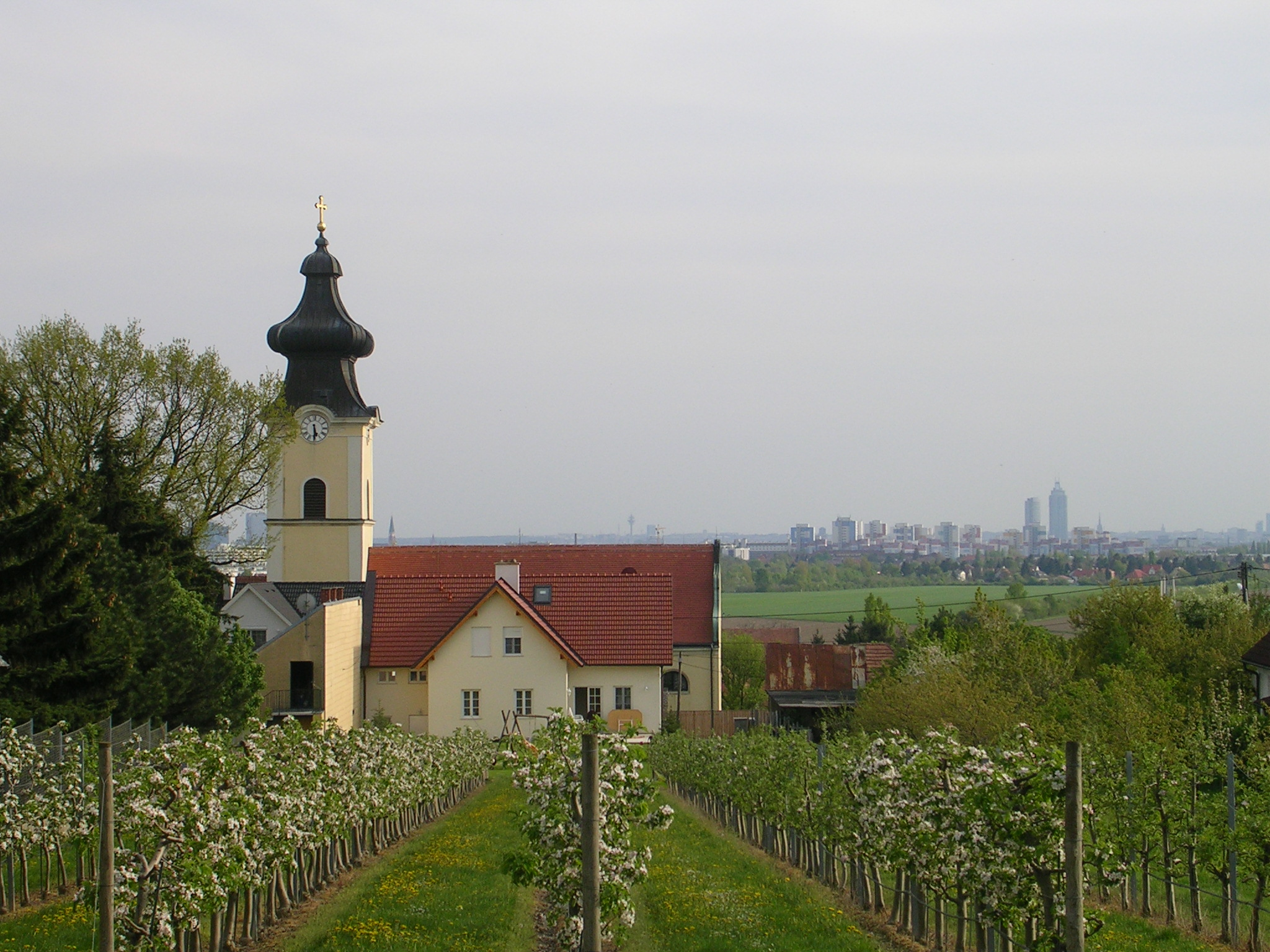 Parish church of Stammersdorf (Wien), St. Nikolaus